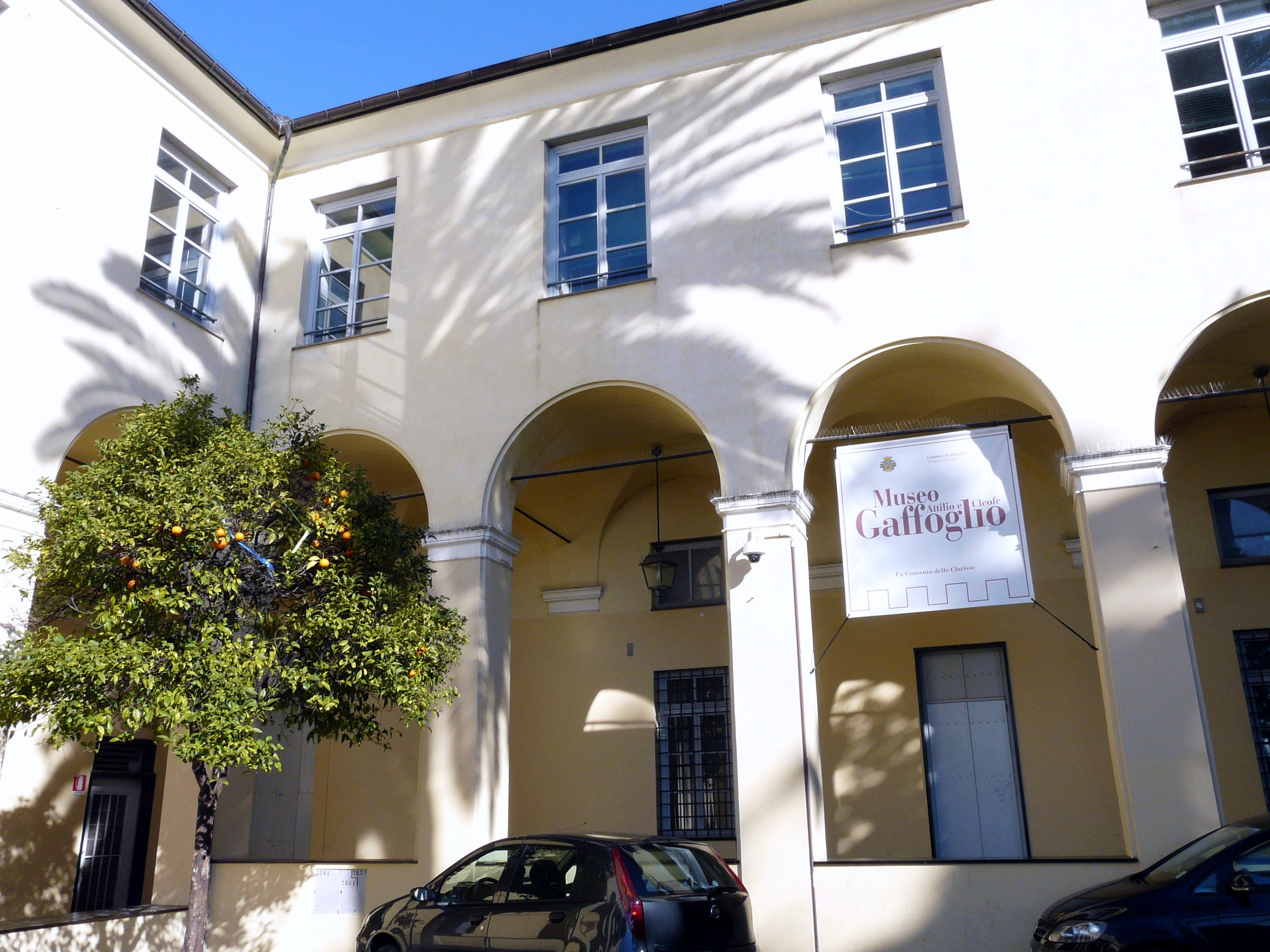 Ex complesso monastico delle Clarisse di Rapallo, Liguria, Italia